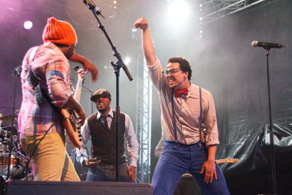 photo de ben l'oncle soul